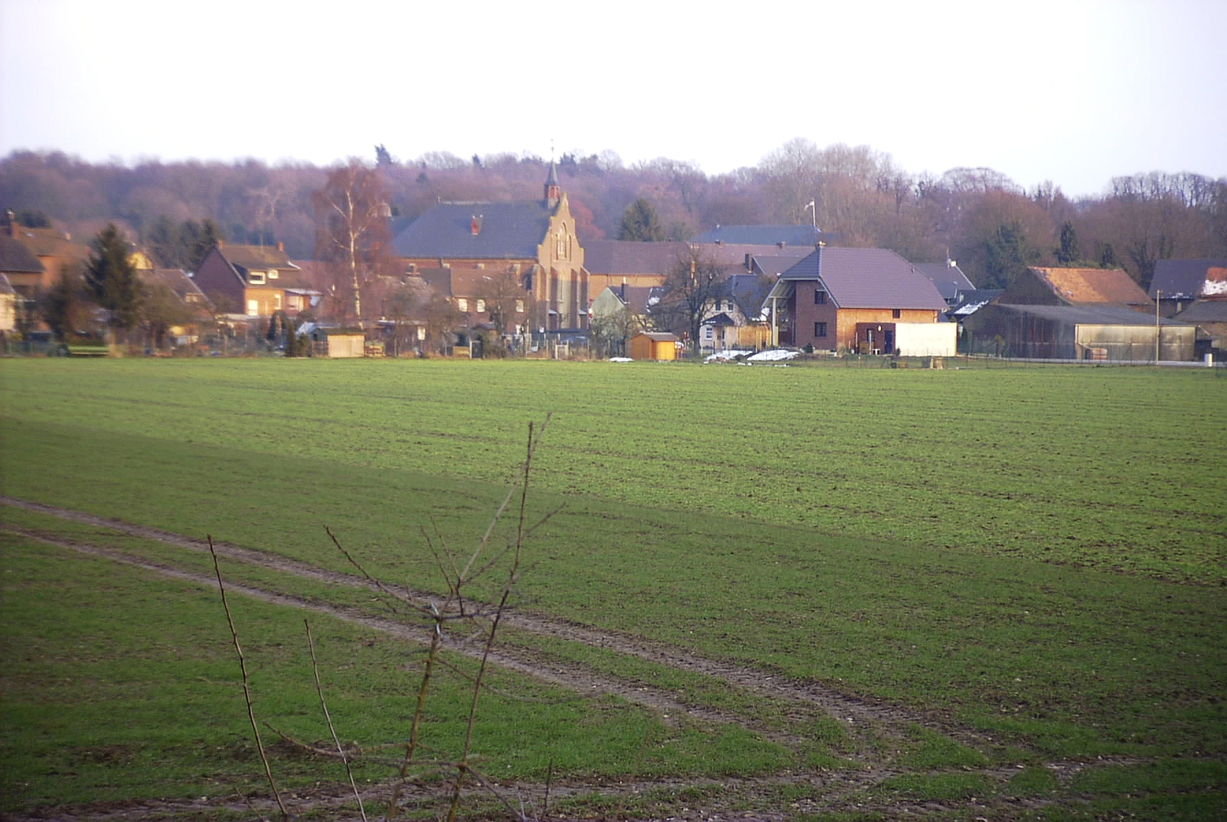 Summary Blick auf die Ortschaft Rurich. eigenes Foto März 2006